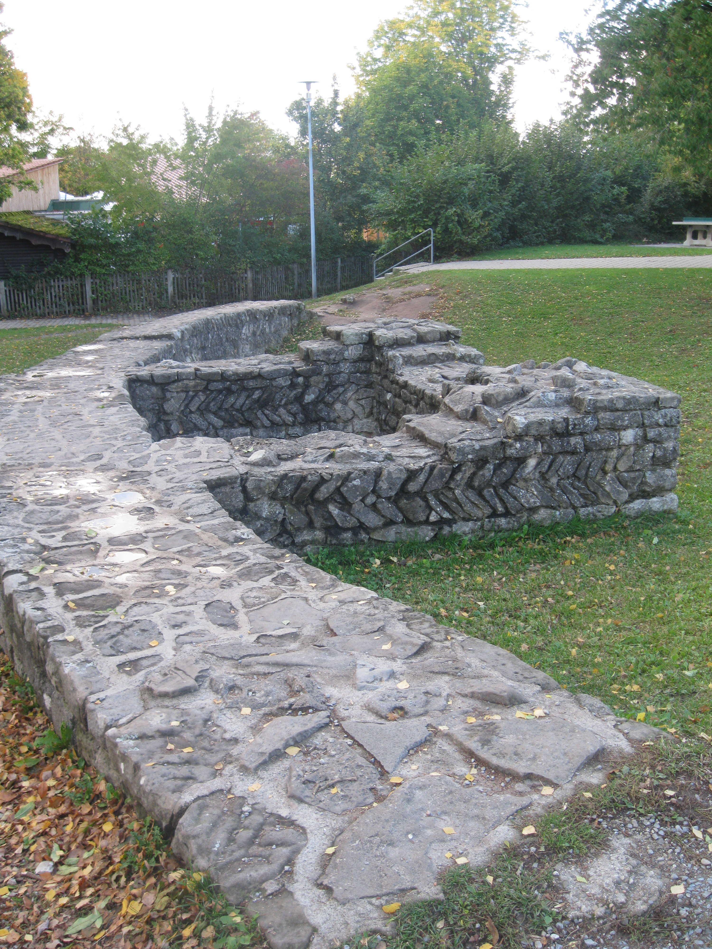 Kastell Mainhadrt